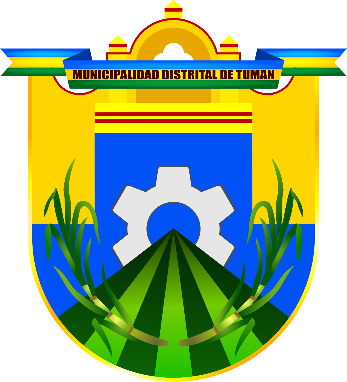 Escudo del Distrito de Tumán - Provincia de Chiclayo - Región Lambayeque